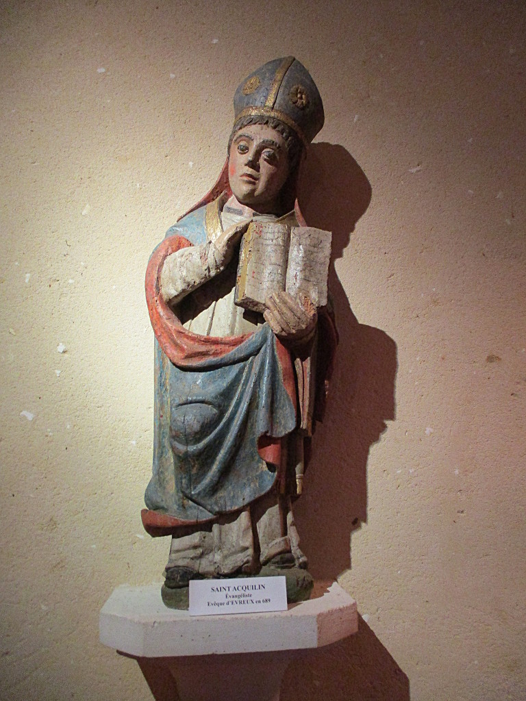 Statue de Saint Aquilin (Aquilin d'Evreux)